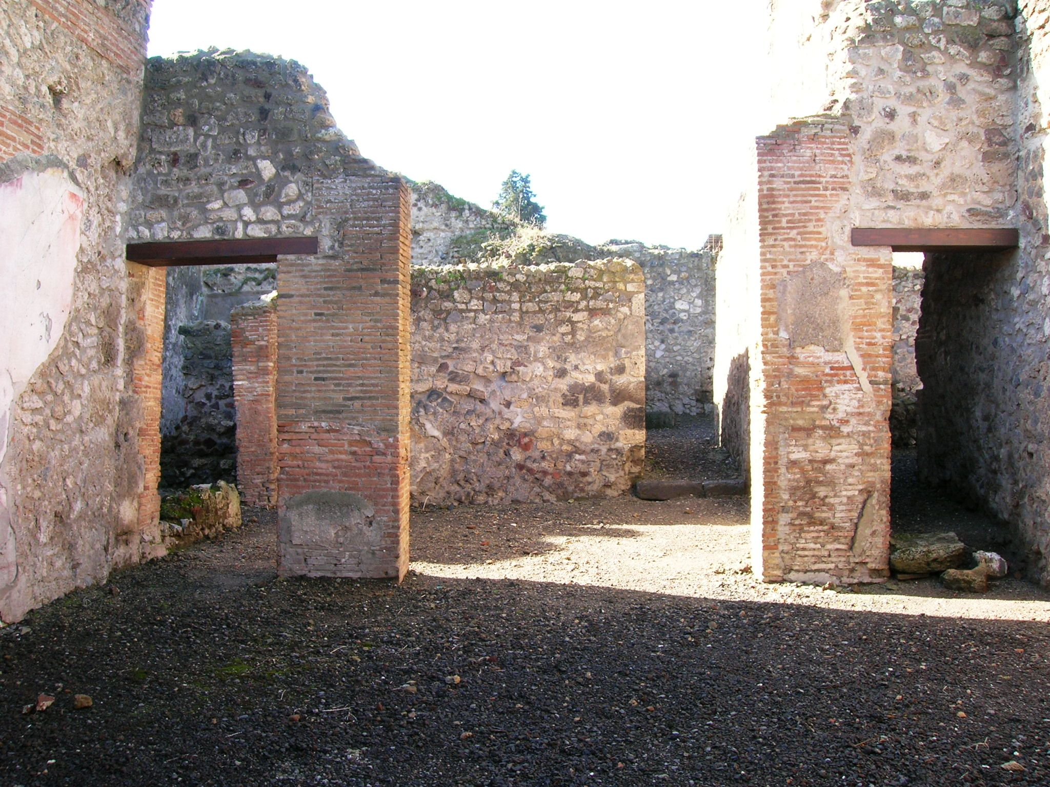 Casa di Lacoonte